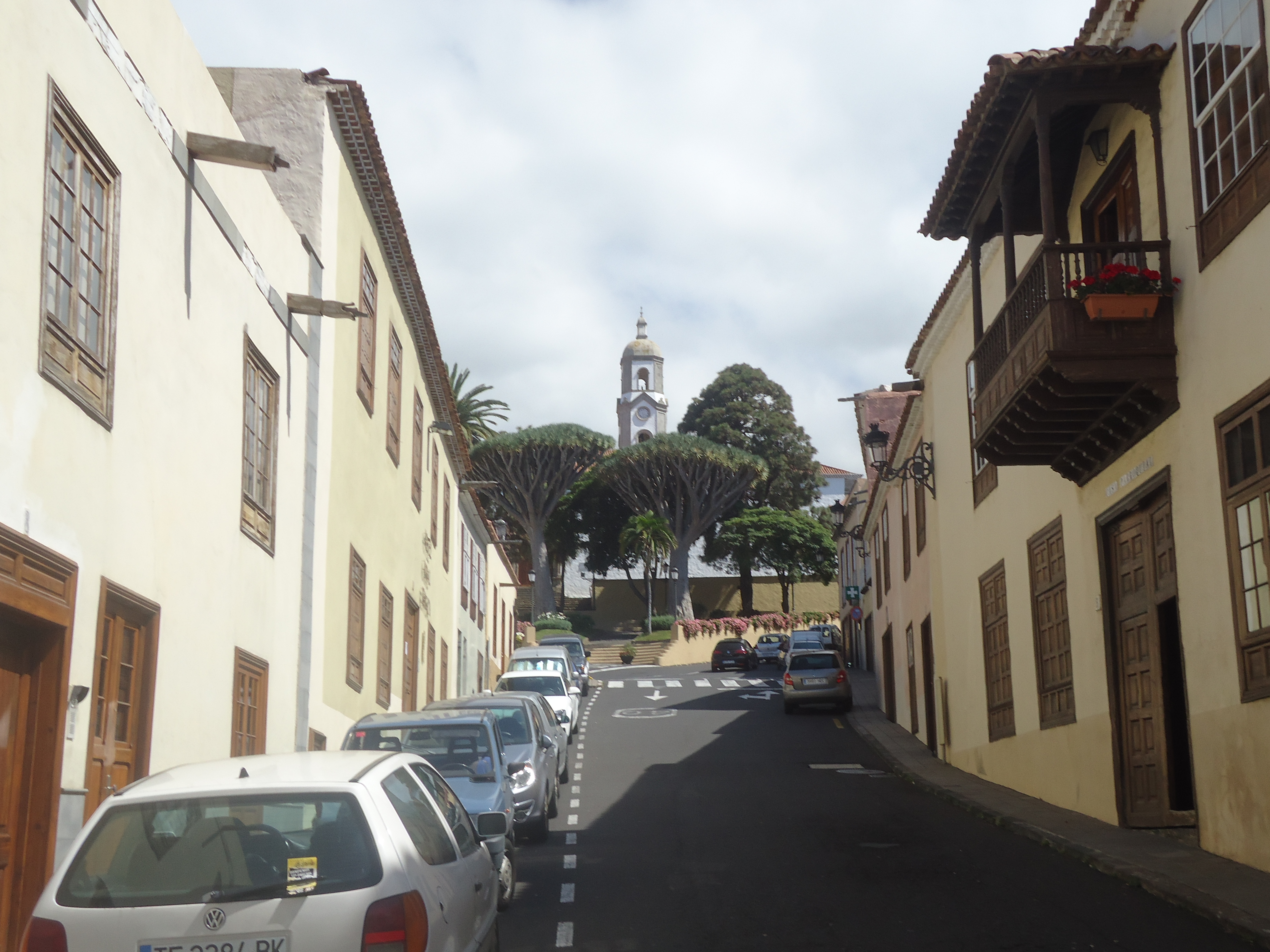 Casco de Realejo Bajo desde la Calle Cantillo.